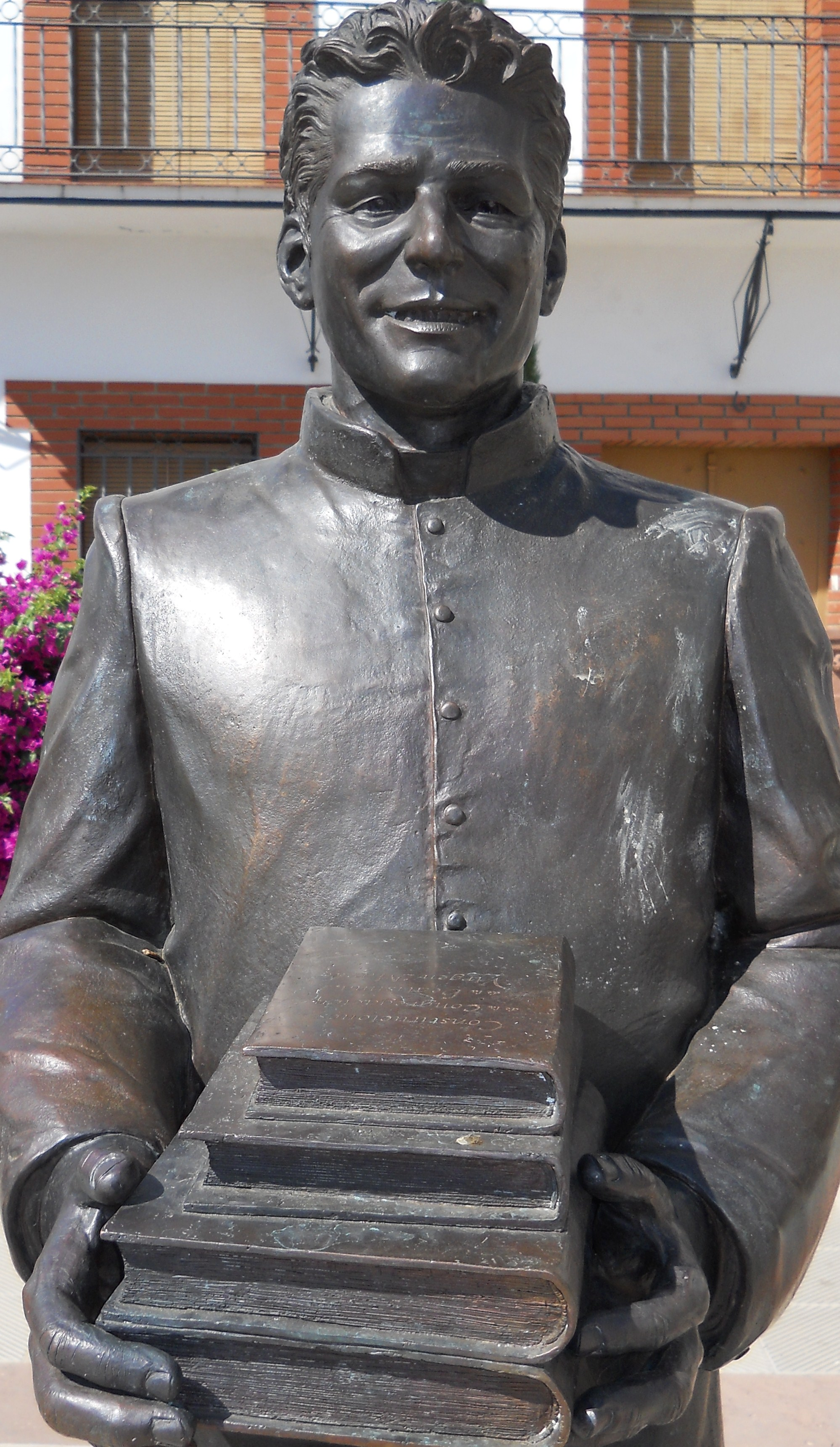 Estatua dedicada a Luis Pérez Ponce en su pueblo natal.